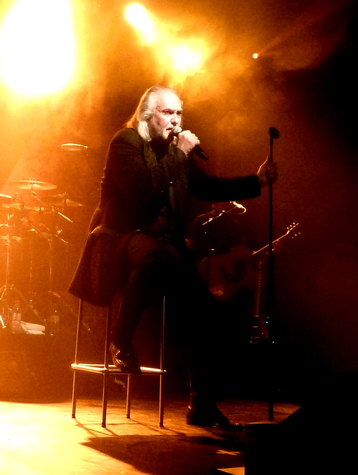 Joachim Witt